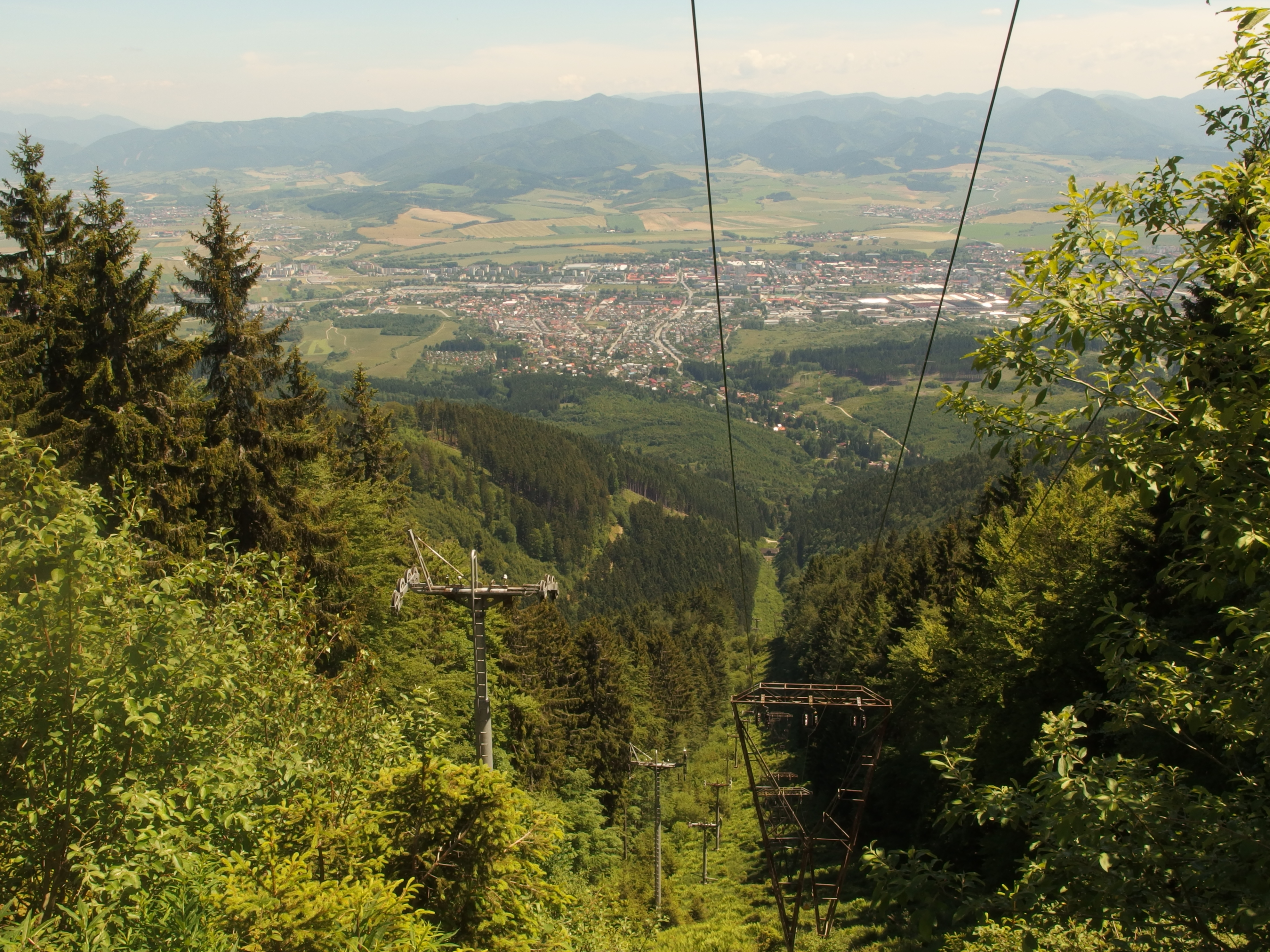 Stará lanovka